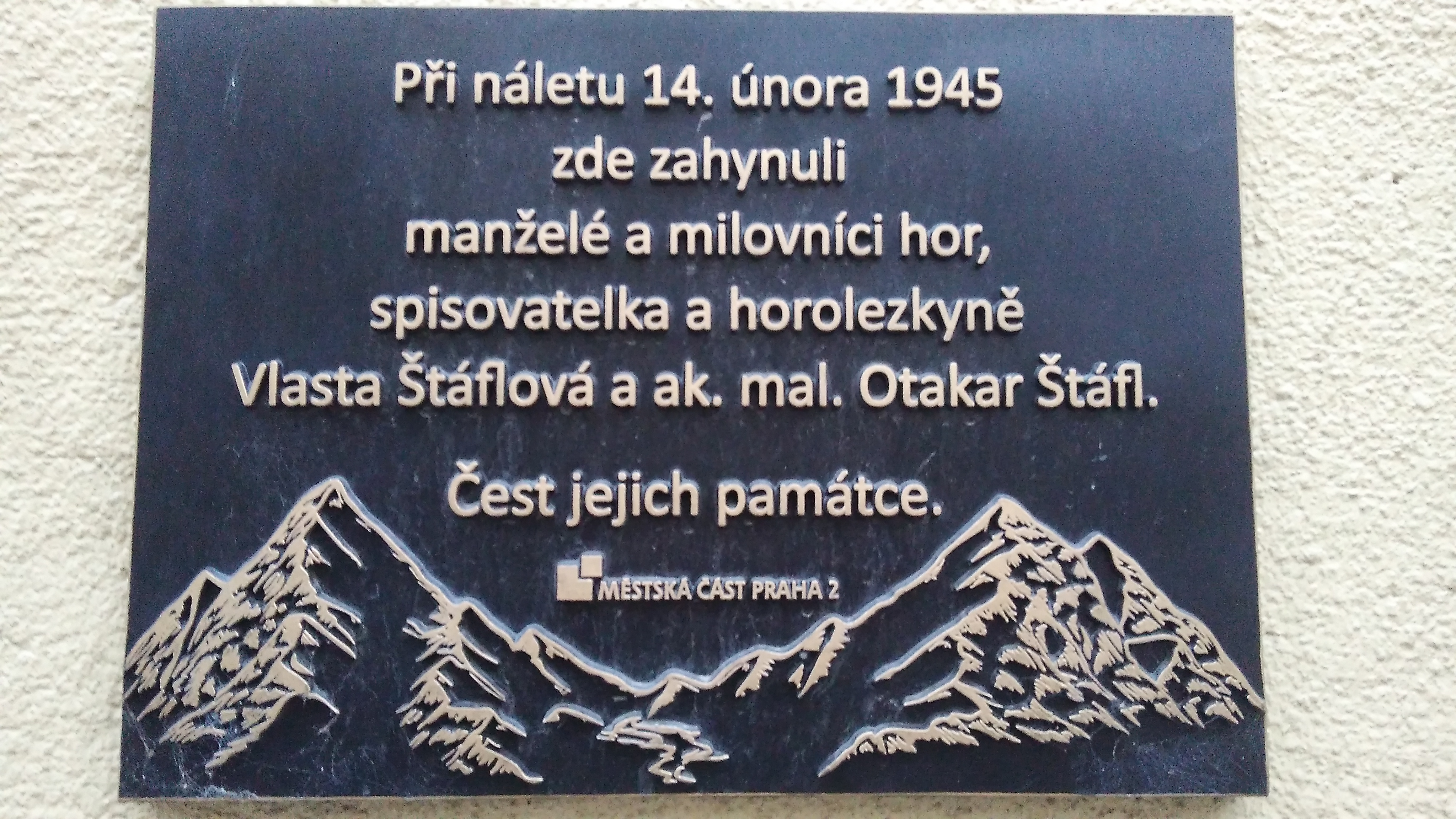 Při náletu 14. února 1945 zde zahynuli manželé a milovníci hor, spisovatelka a horolezkyně Vlasta Štáflová a ak. mal. Otakar Štáfl. Čest jejich památce.